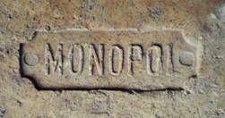 огнеупорная плитка